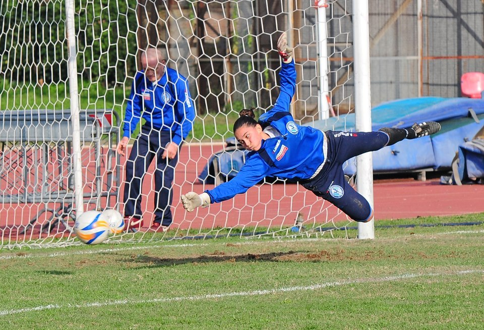 Valentina Casaroli durante un riscaldamento pre-partita